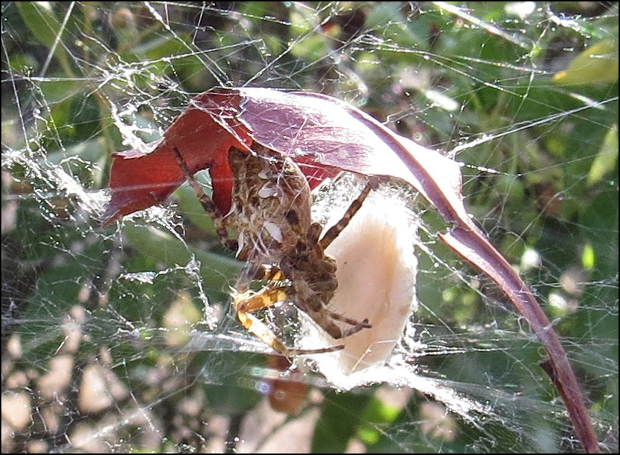 Femelle de Cyrtophora citricola sur son premier cocon sous l'abri protecteur d'une feuille morte tombée dans la toile orbiculaire composite. Les Brégines, près de Béziers, Occitanie, Juillet 2019.